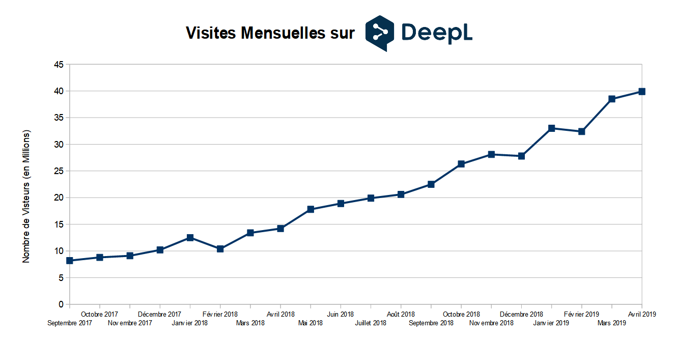 Graphique de l'évolution du nombre de visiteurs sur "DeepL". Source des informations contenues dans le graphique